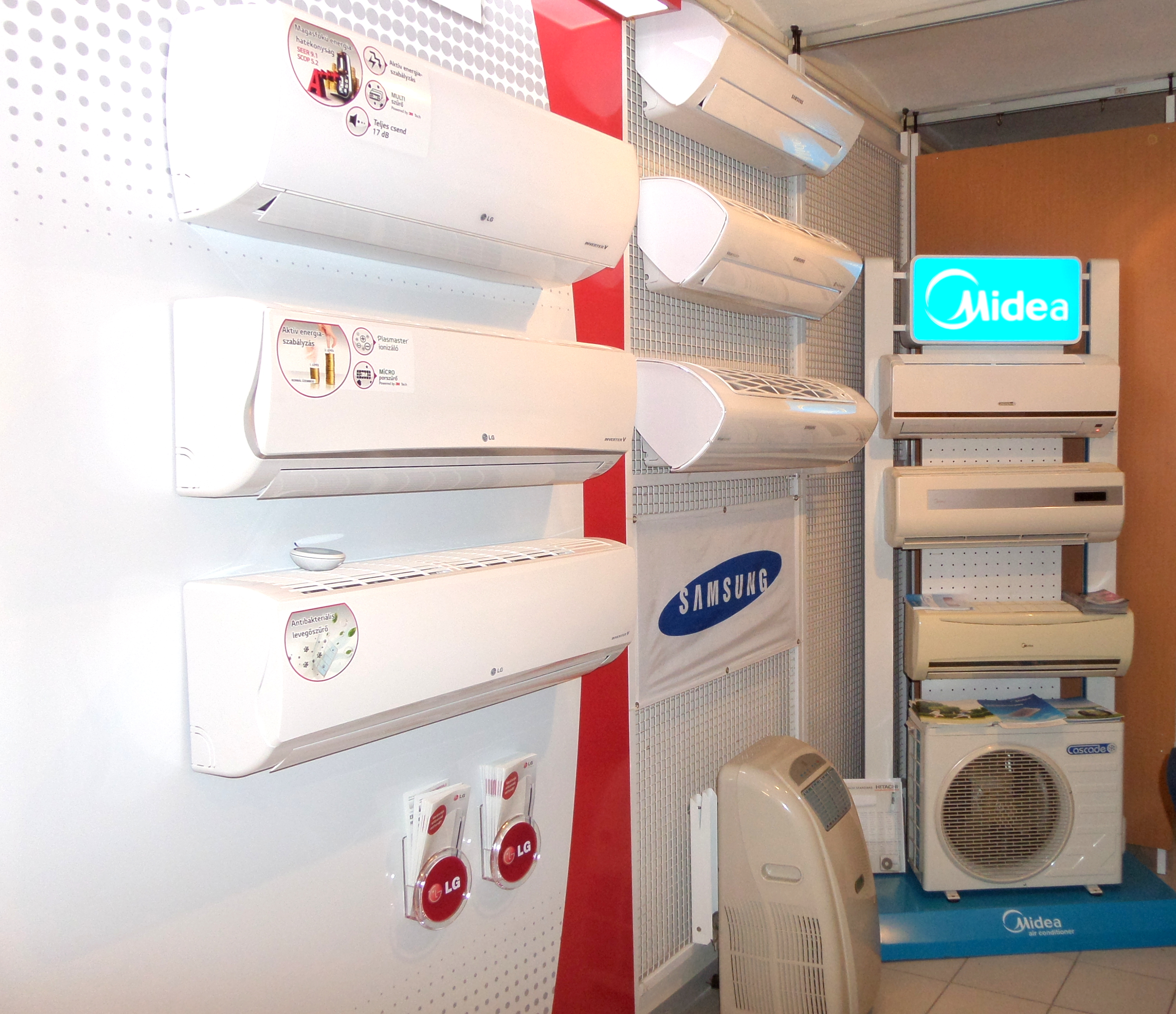 Oldalfali split légkondícionálók és felszerelt kültéri egység.